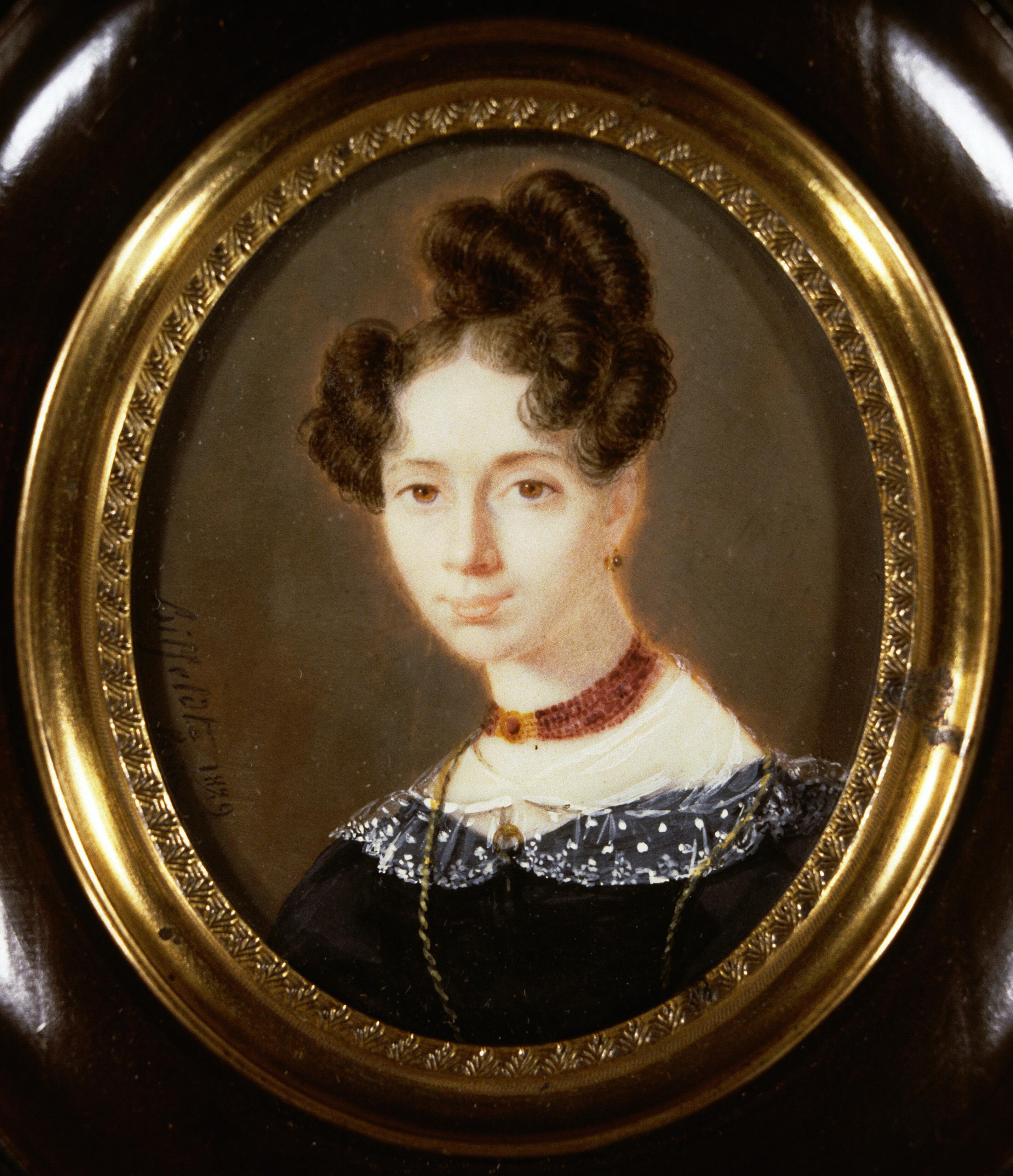 Portret van Louise Sophie Blussé (1801-1896)